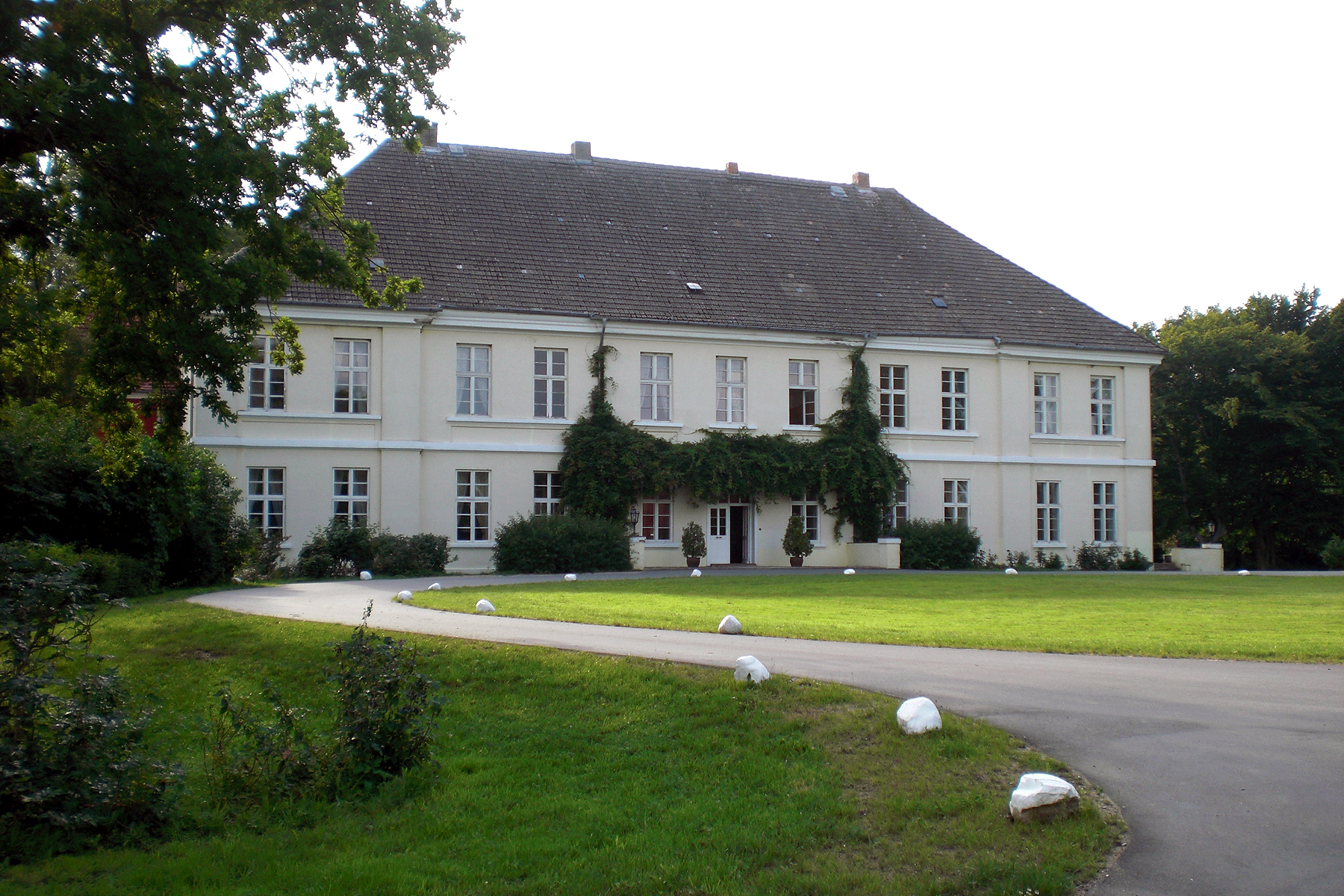 Gutshaus in Samow, Landkreis Rostock Mecklenburg-Vorpommern